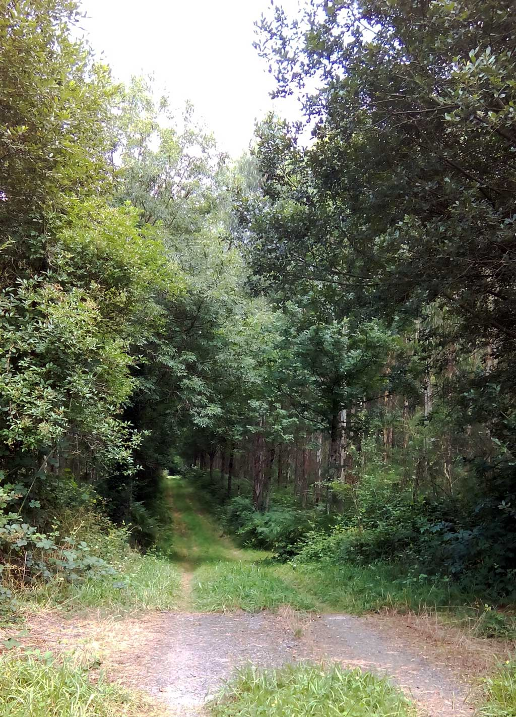 Portasbestas, Curtis.